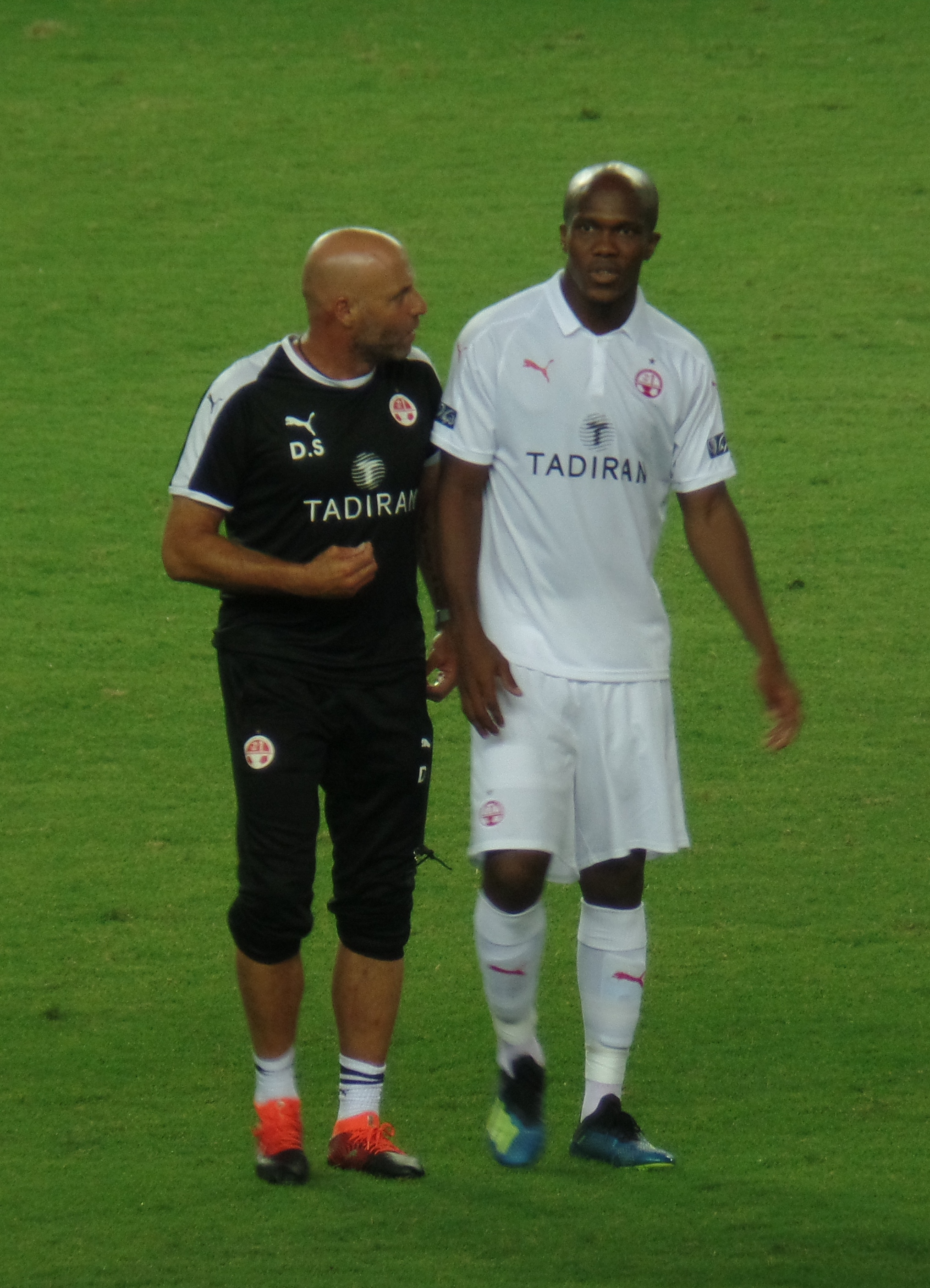 טוני ואקמה במדי הפועל באר-שבע, 2018